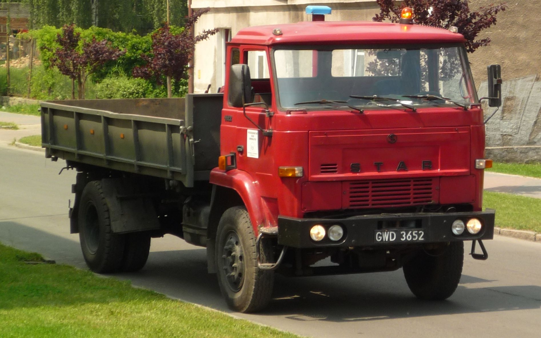 Star 1142 w Słubicach.